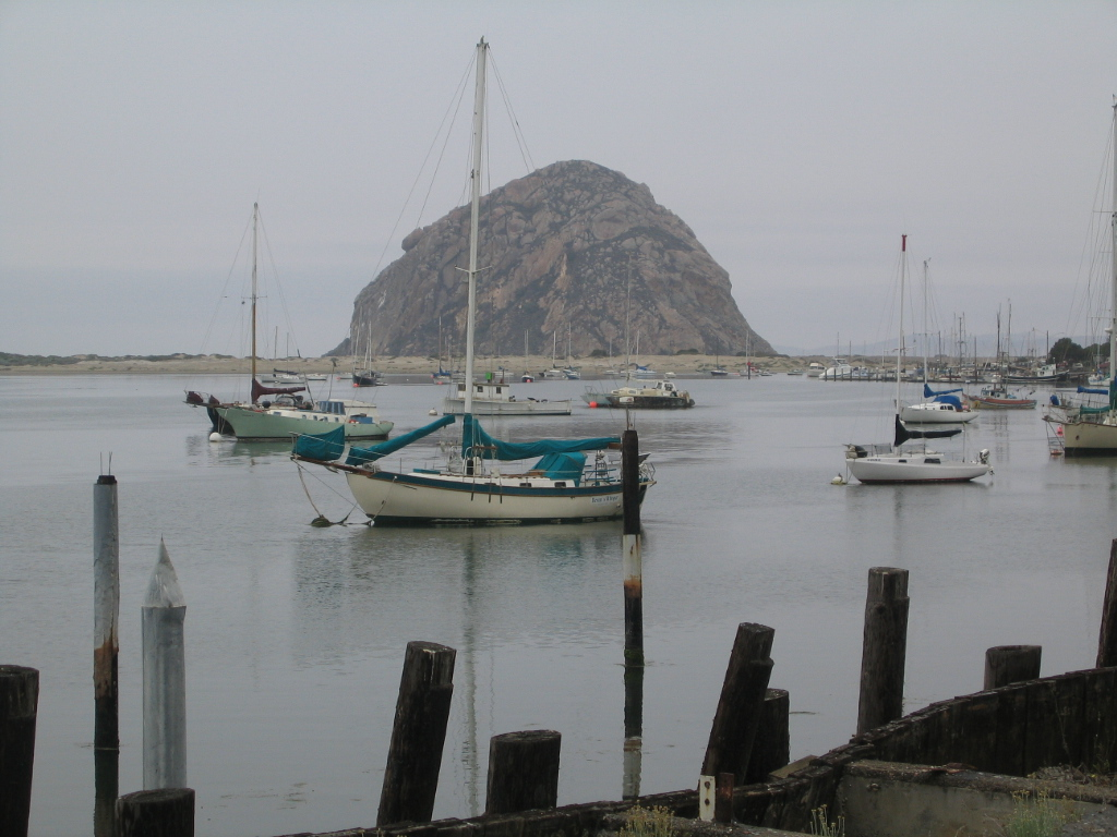 Morro Bay